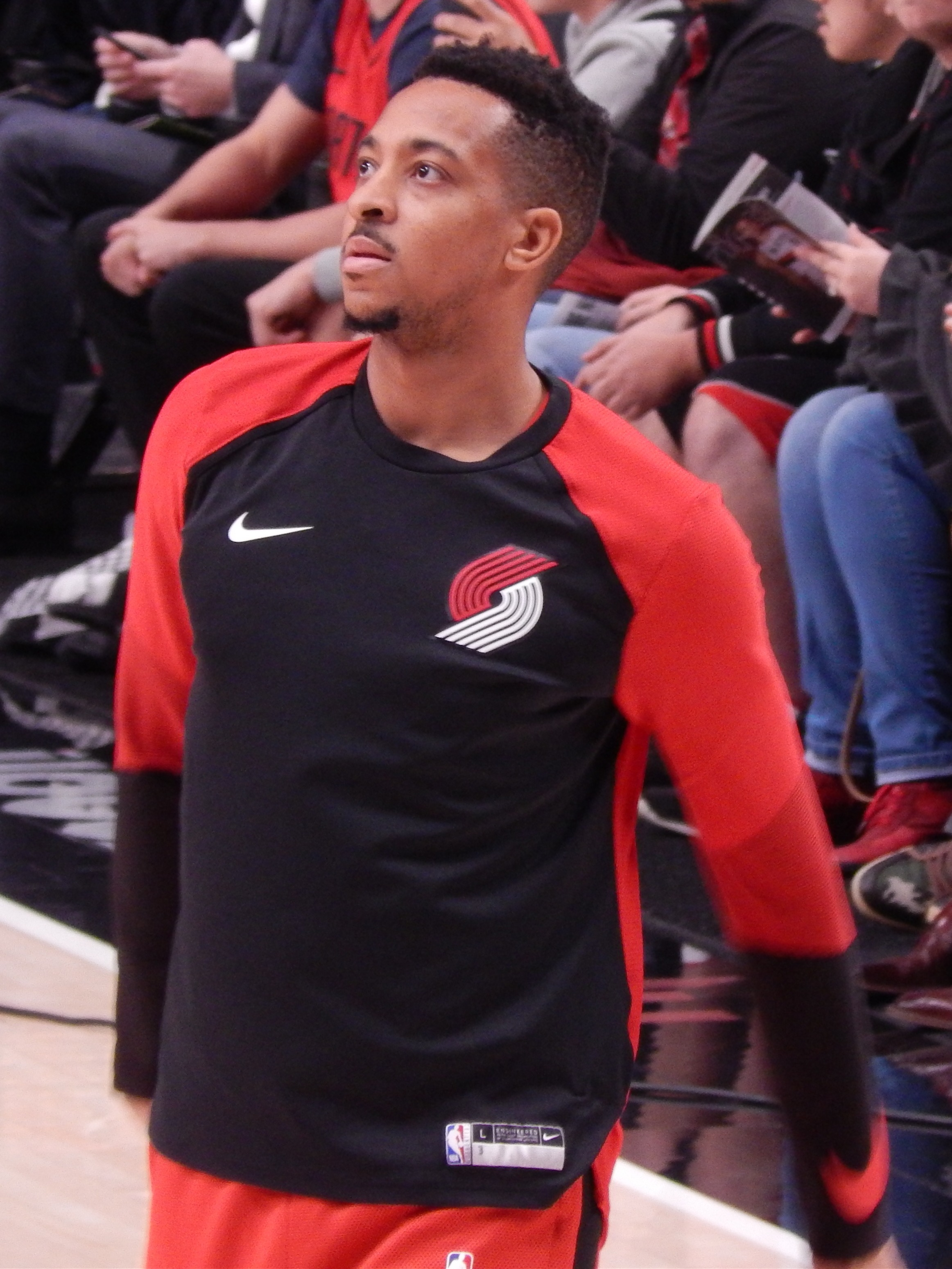 C. J. McCollum #3 of the Portland Trail Blazers against the Los Angeles Clippers on November 8, 2018 at Moda Center in Portland, Oregon.